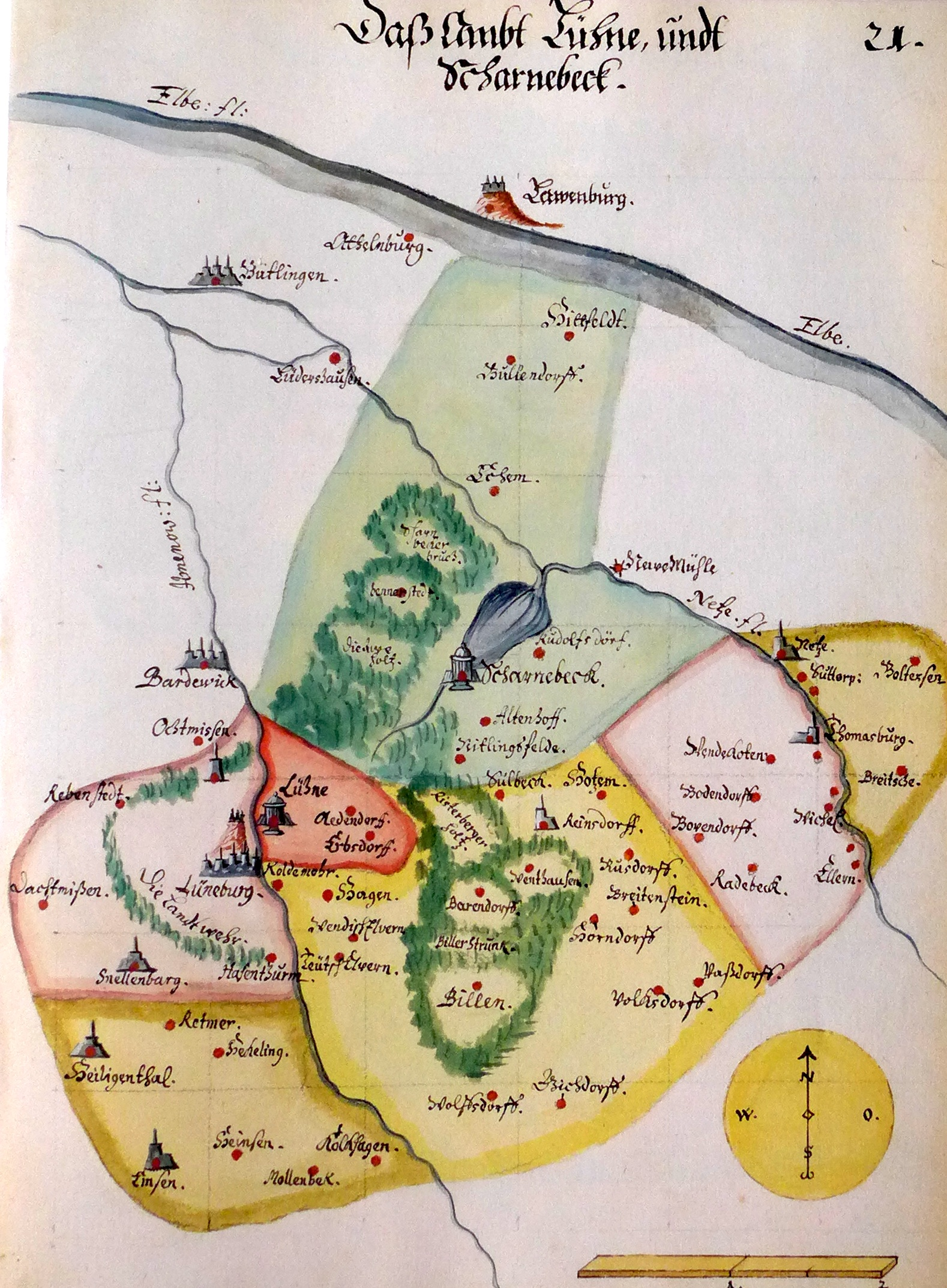 Ämteratlas des Fürstentums Lüneburg von Johannes Mellinger, um 1600 – Reproduktion der in der Niedersächsischen Staats- und Universitätsbibliothek Göttingen lagernden Kopie aus dem Ende des 17. Jahrhunderts